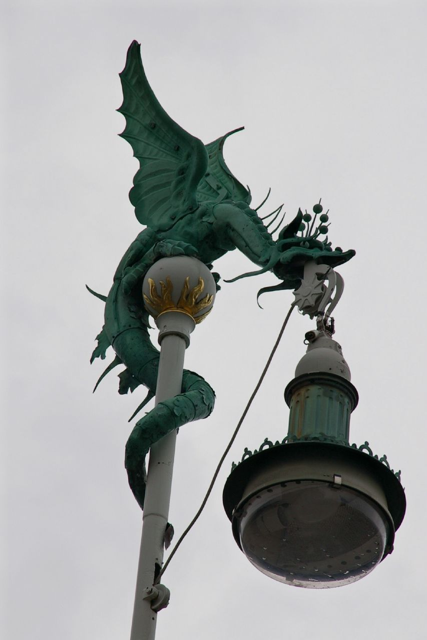 Dragon street lights designed by Vilhelm Dahlerup at Nordre Toldbod in Copenhagen, Denmark